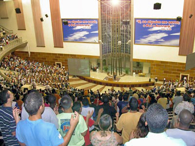 Culto, Catedral Mundial da Fé, Rio de Janeiro